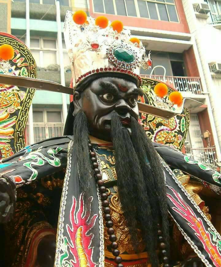 臺南南沙宮 包大人